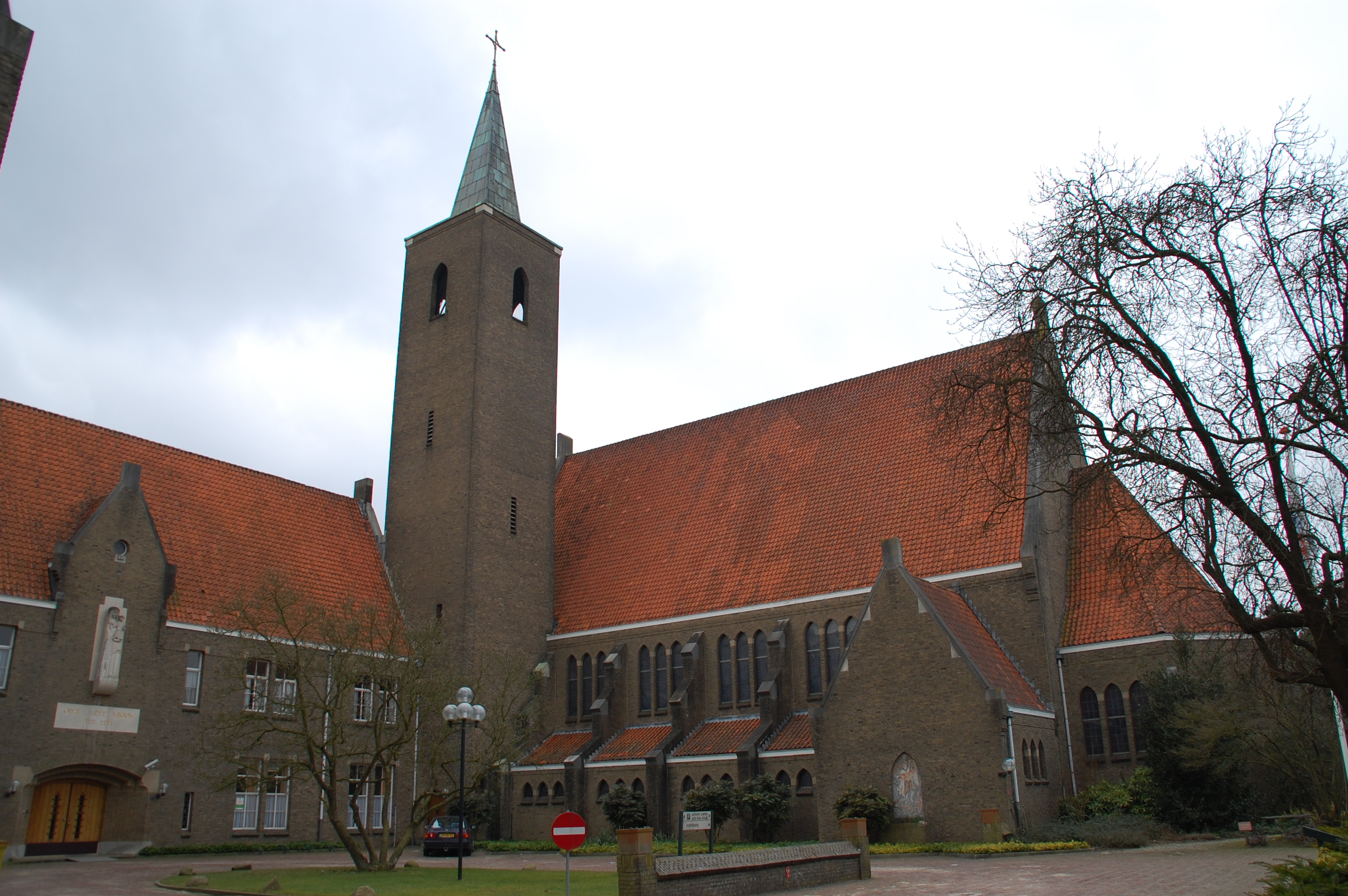 Het klooster Onze Lieve Vrouw ter Eem in Amersfoort Rapportage Rijksmonument (